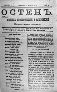 Вестник "Остен"